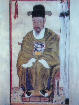 오연총 영정